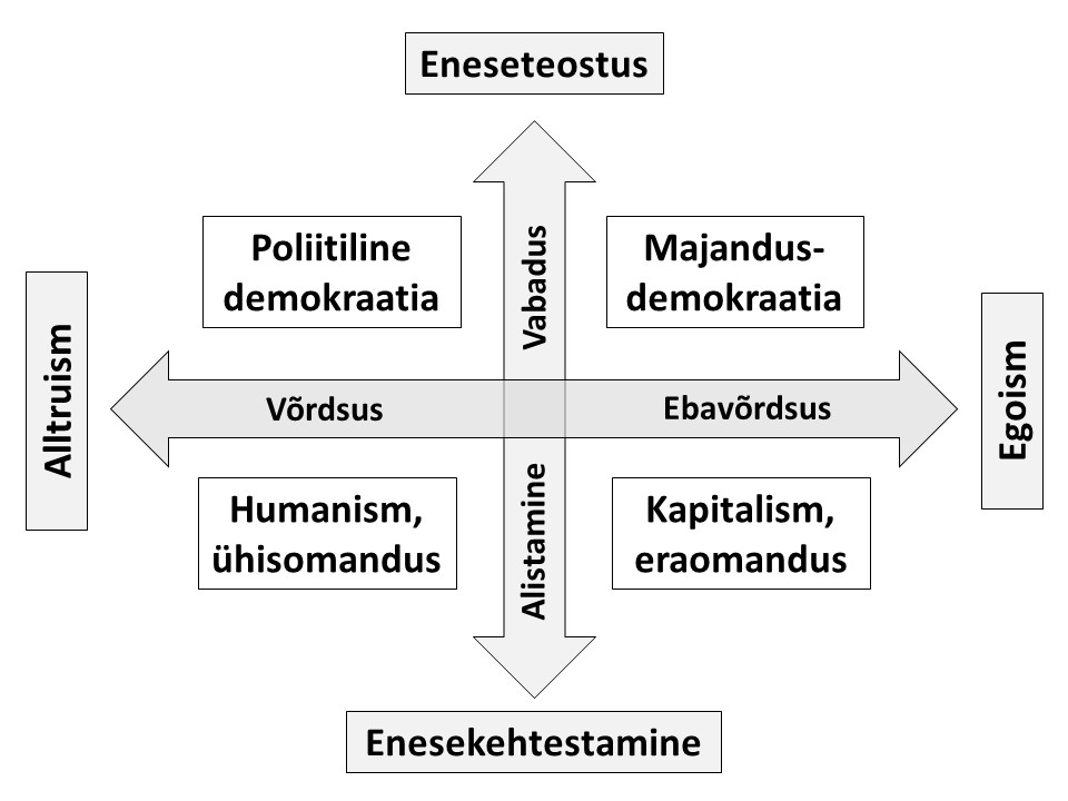 Kahe-dimensiooniline poliitikakäsitlus